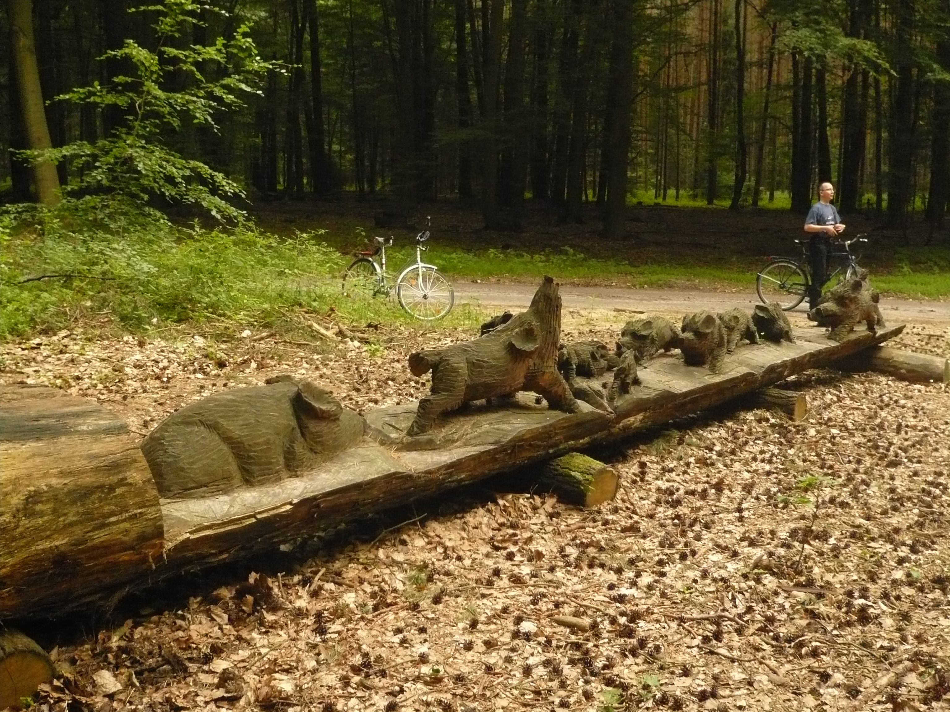 Wandlitz, Holzarbeit an der Schutzhütte im Liepnitzforst